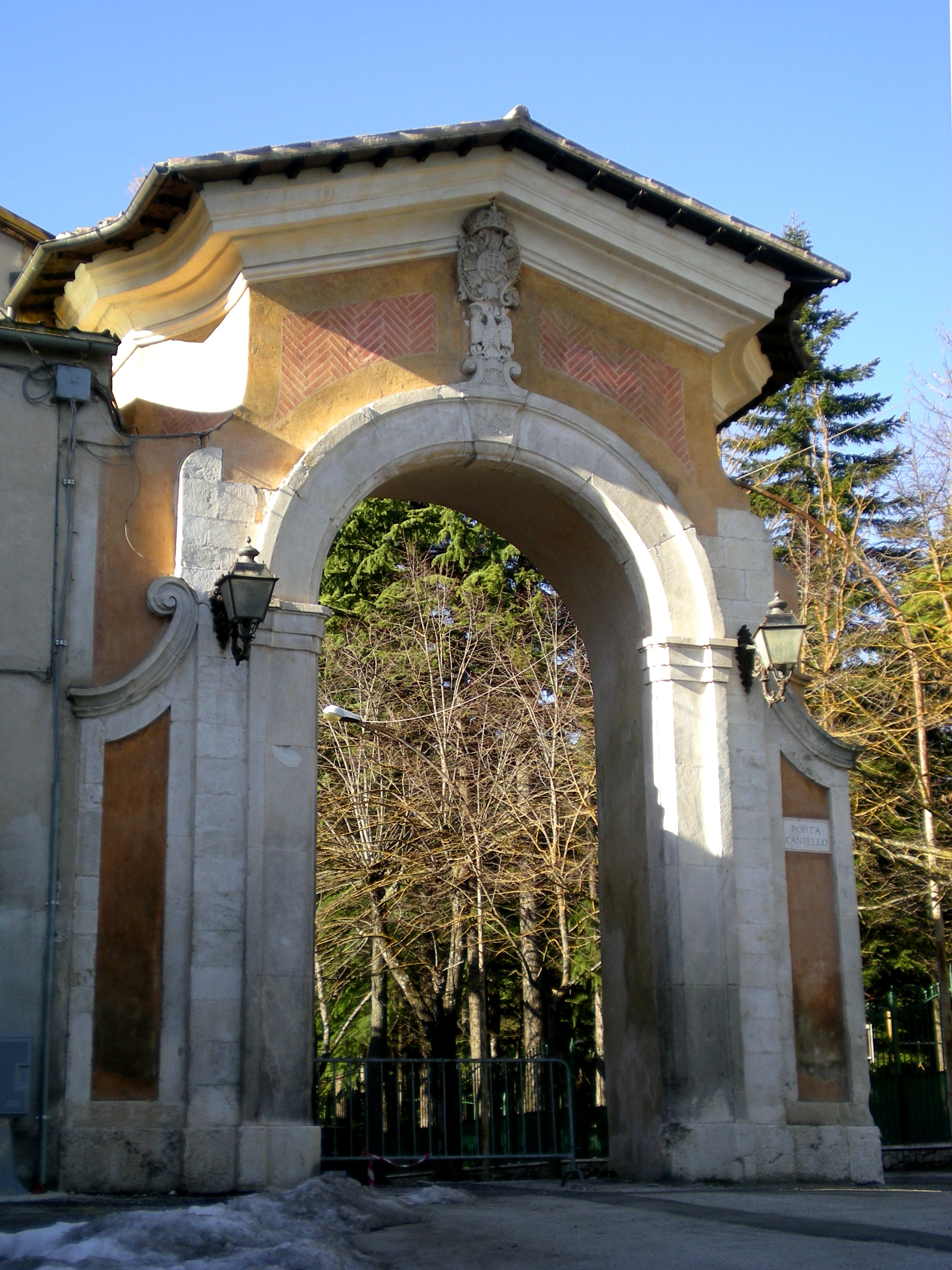 Porta Castello (L'Aquila): vista esterna